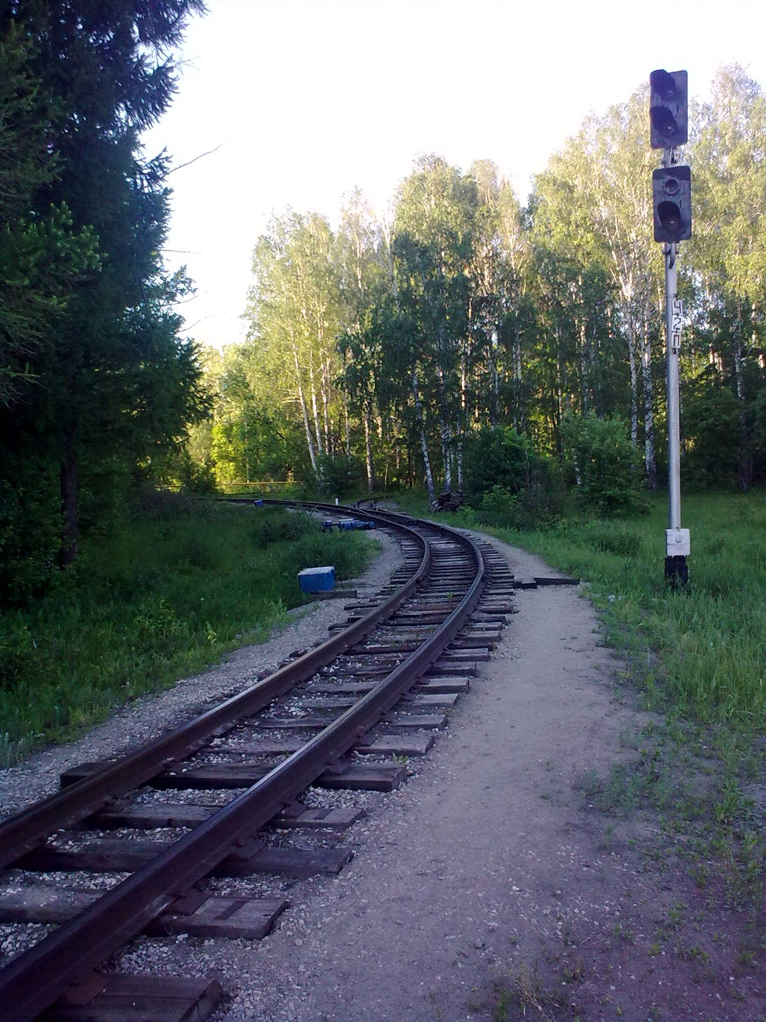 Светофор Пензенской детской железной дороги